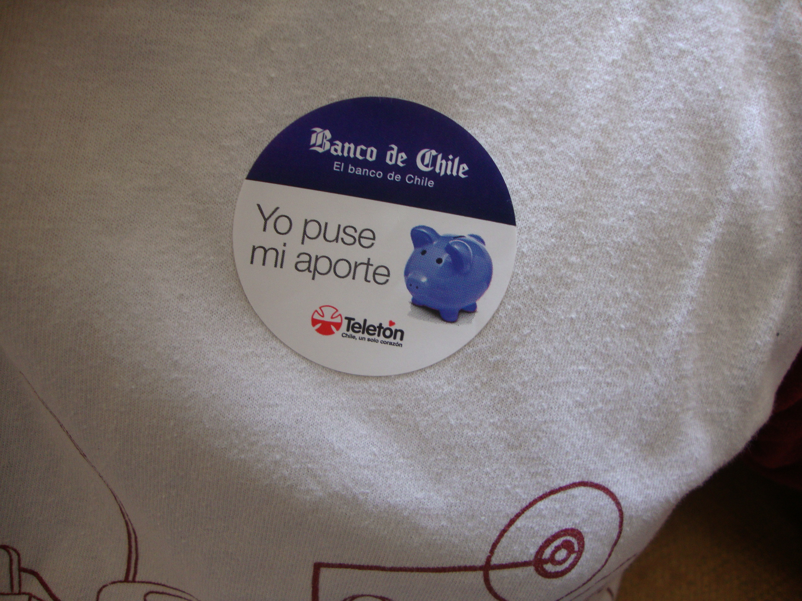 Distintvio de la Teletón 2010, agradeciendo el aporte realizado a la institución.